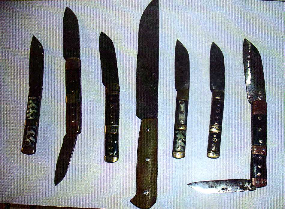 Couteaux crées par Phillipps Adam 1890